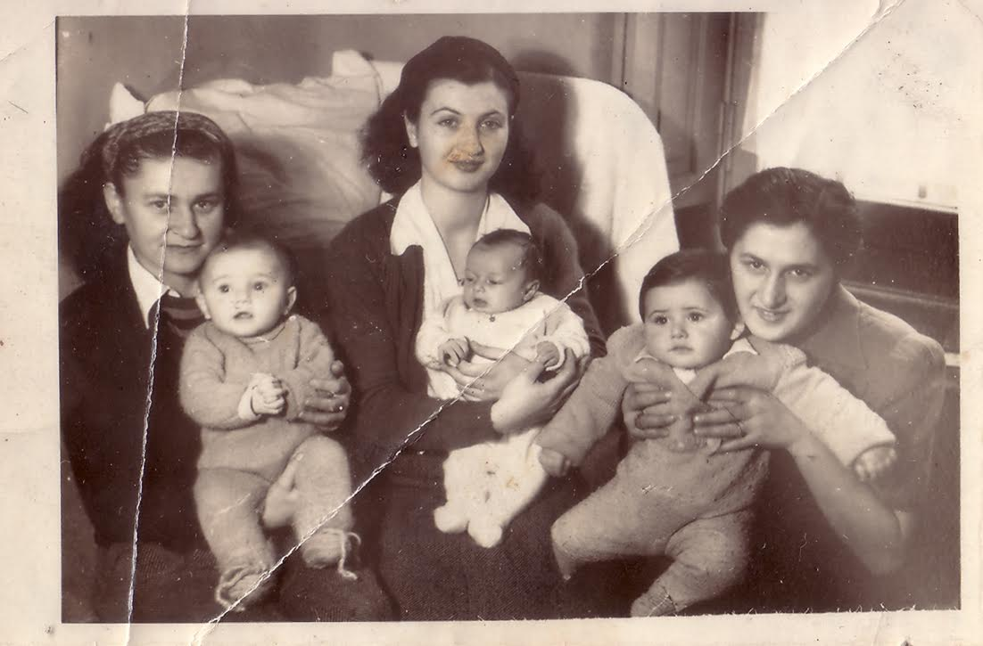 שלוש אמהות עם תינוקיהם שנולדו במחנה העקורים גרוליאסקו